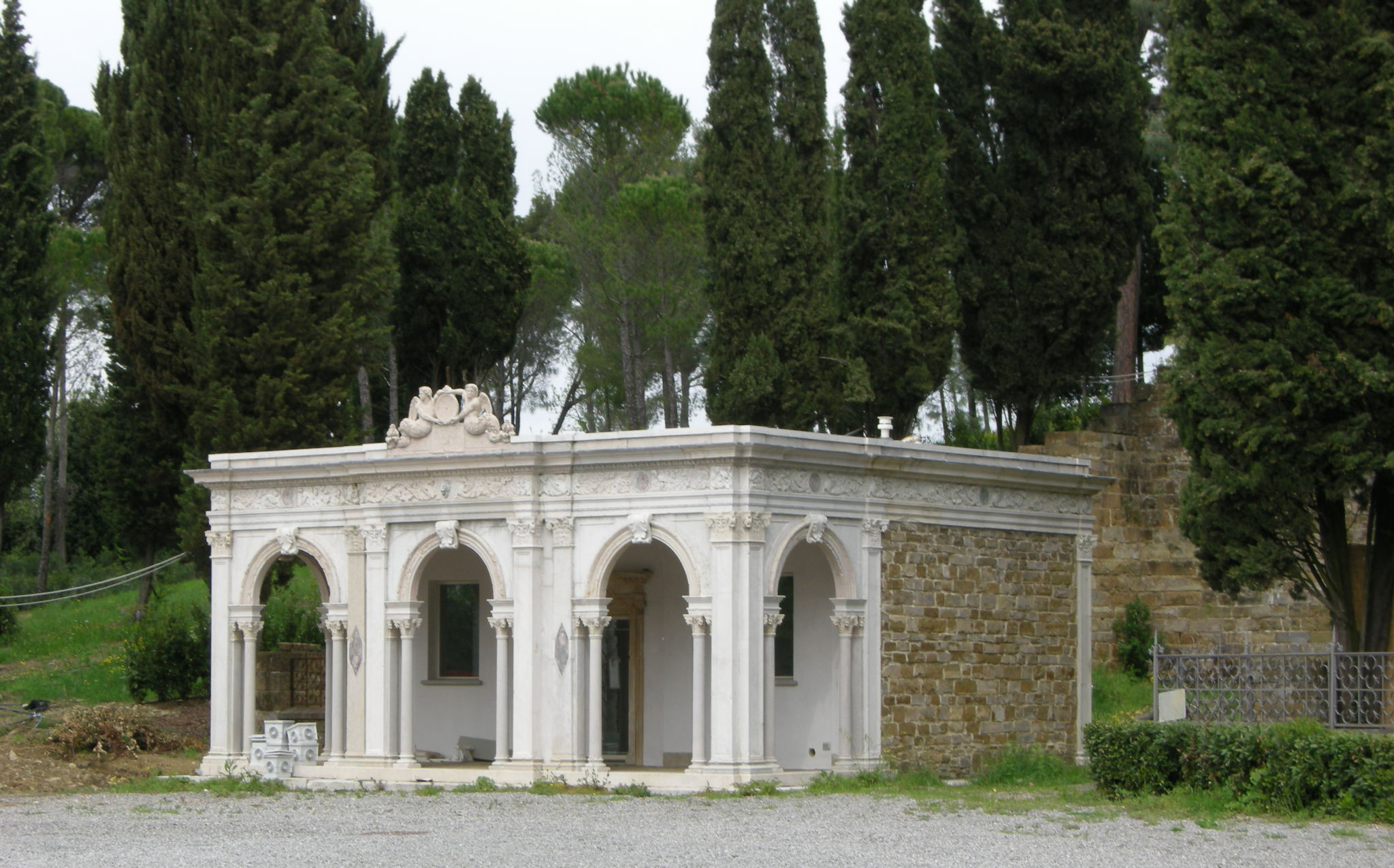 Loggetta della torre del gallo